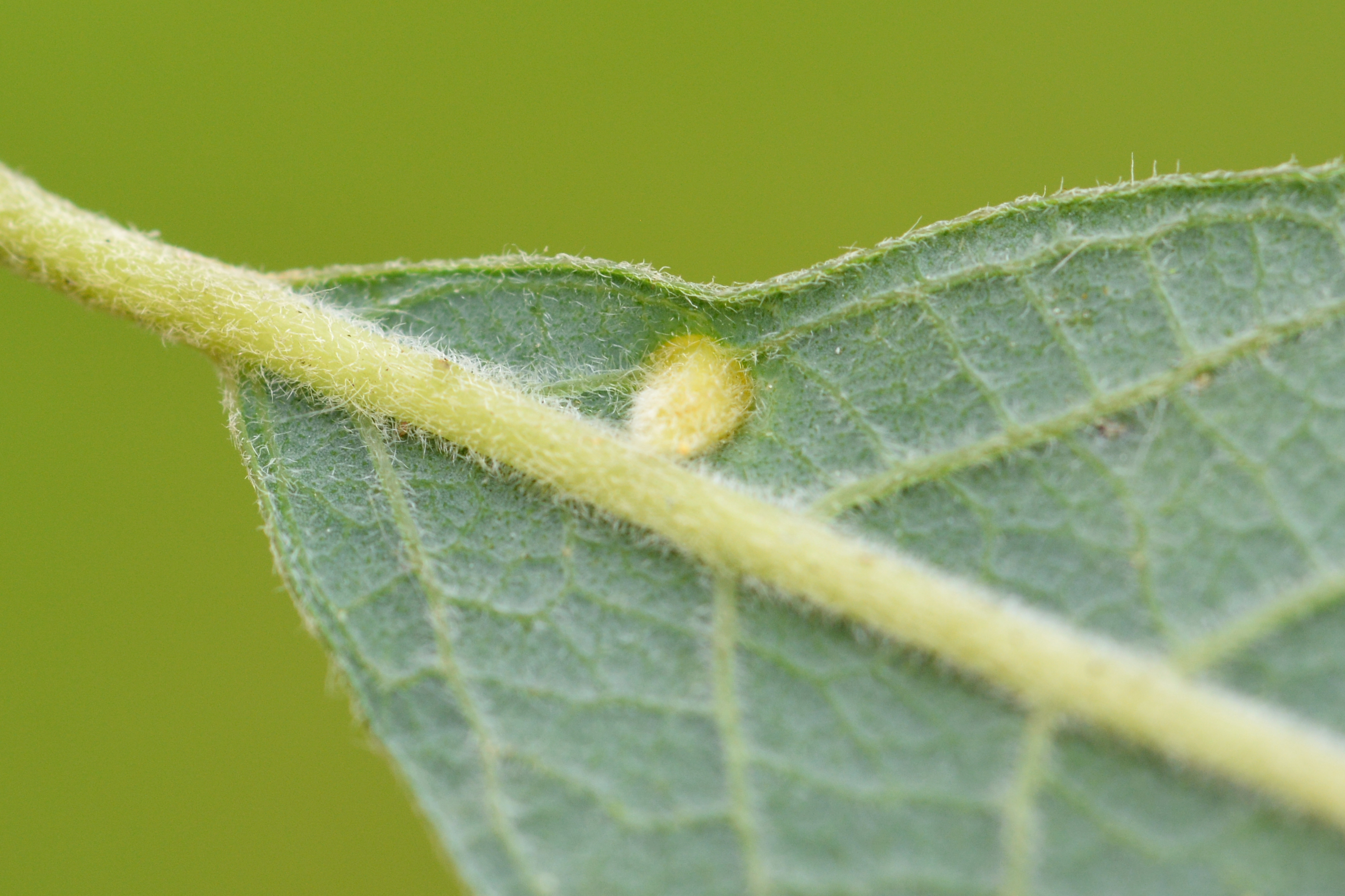 Aculus laevis (Acari) gall on Salix cinerea